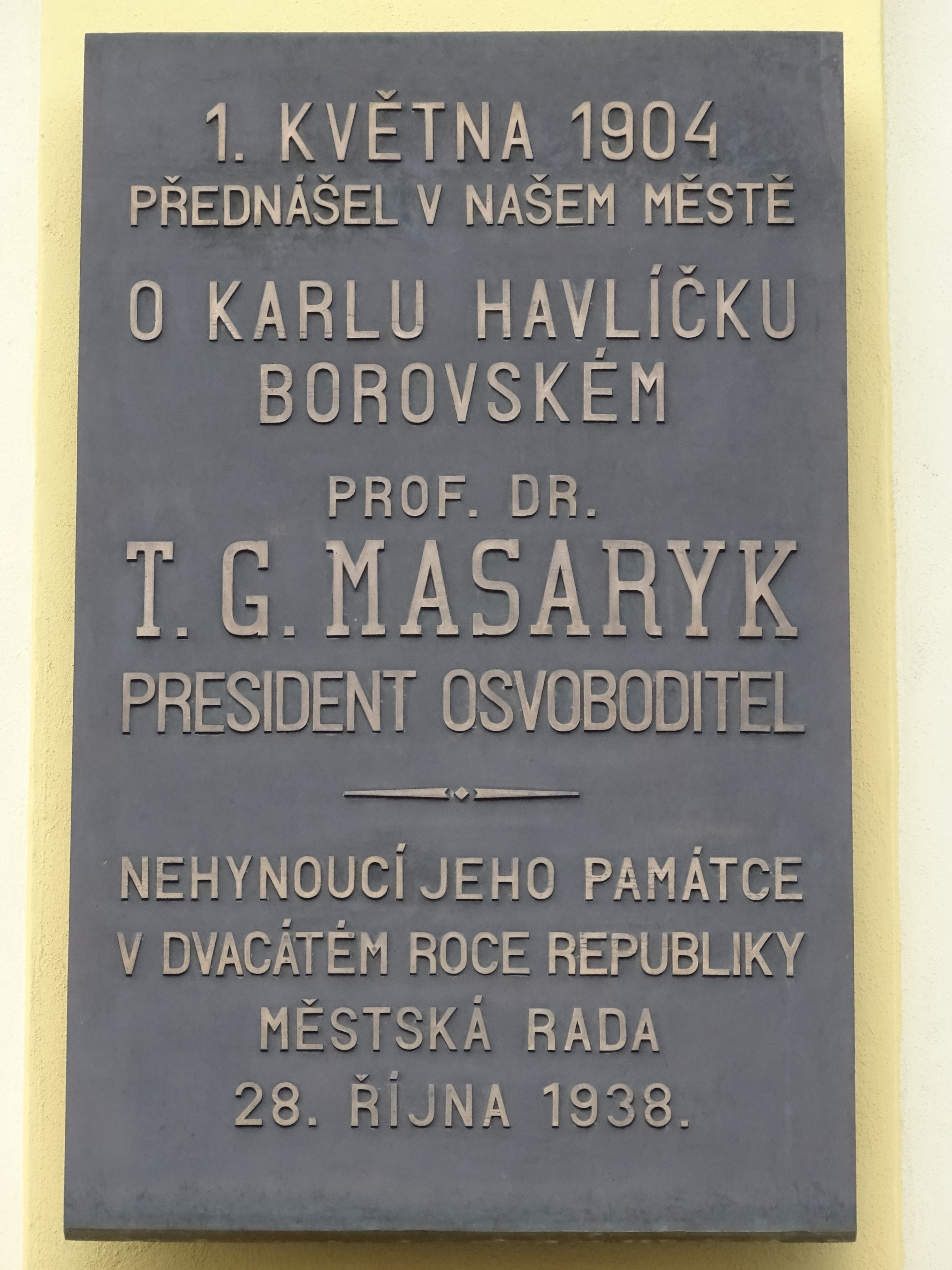 přednáška v roku 1904